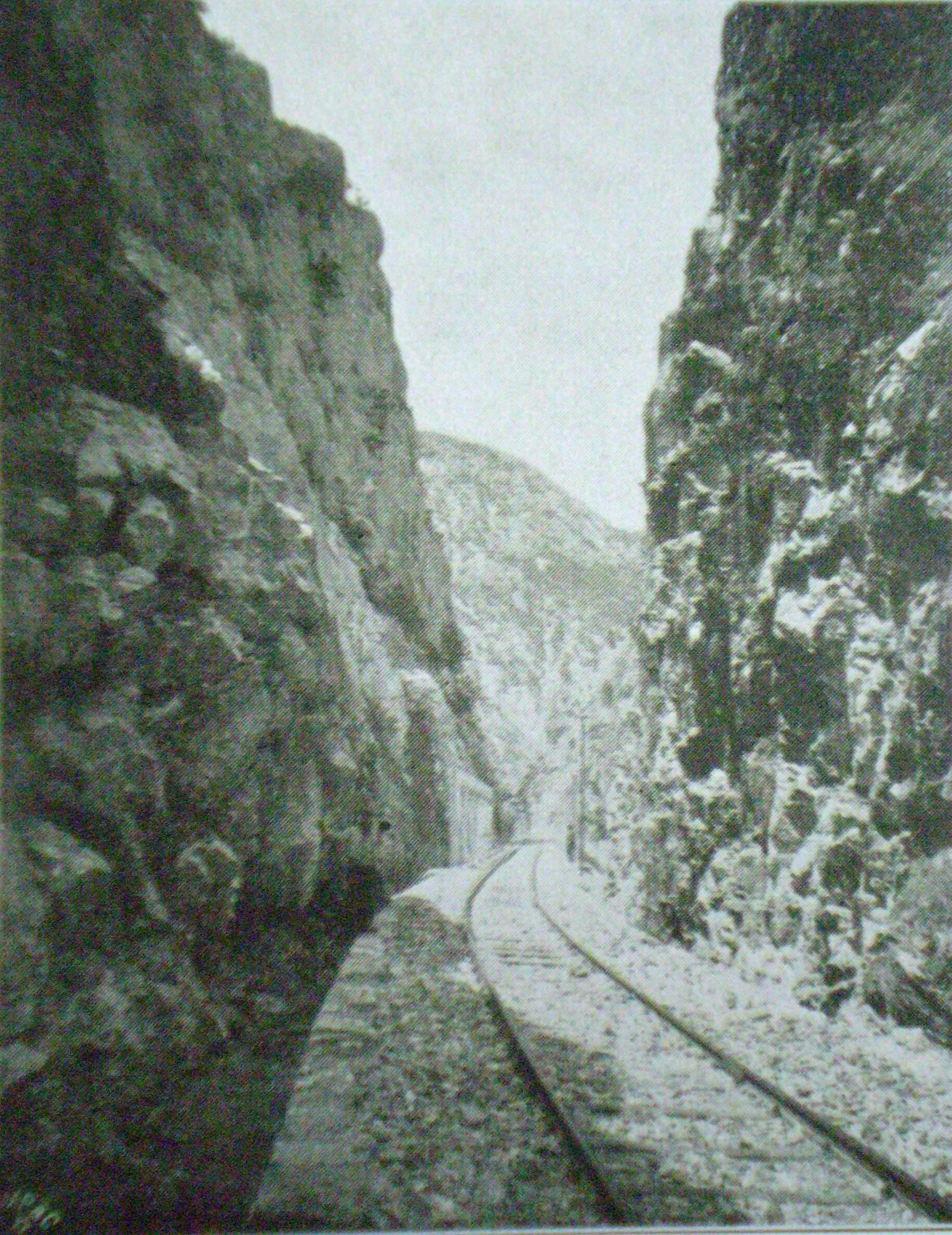 Anatolische Eisenbahn, Defile durch das Tal des Karasu